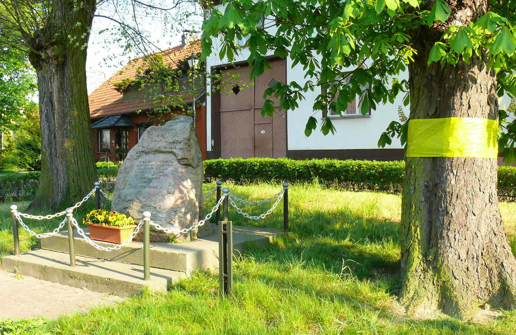 Kamień upamiętniający poległych Powstańców Wielkopolskich